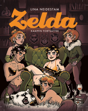 Lina Neidestam, Zelda 2: Kampen förtsätter